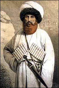 Imam Shamil (1797-1871)